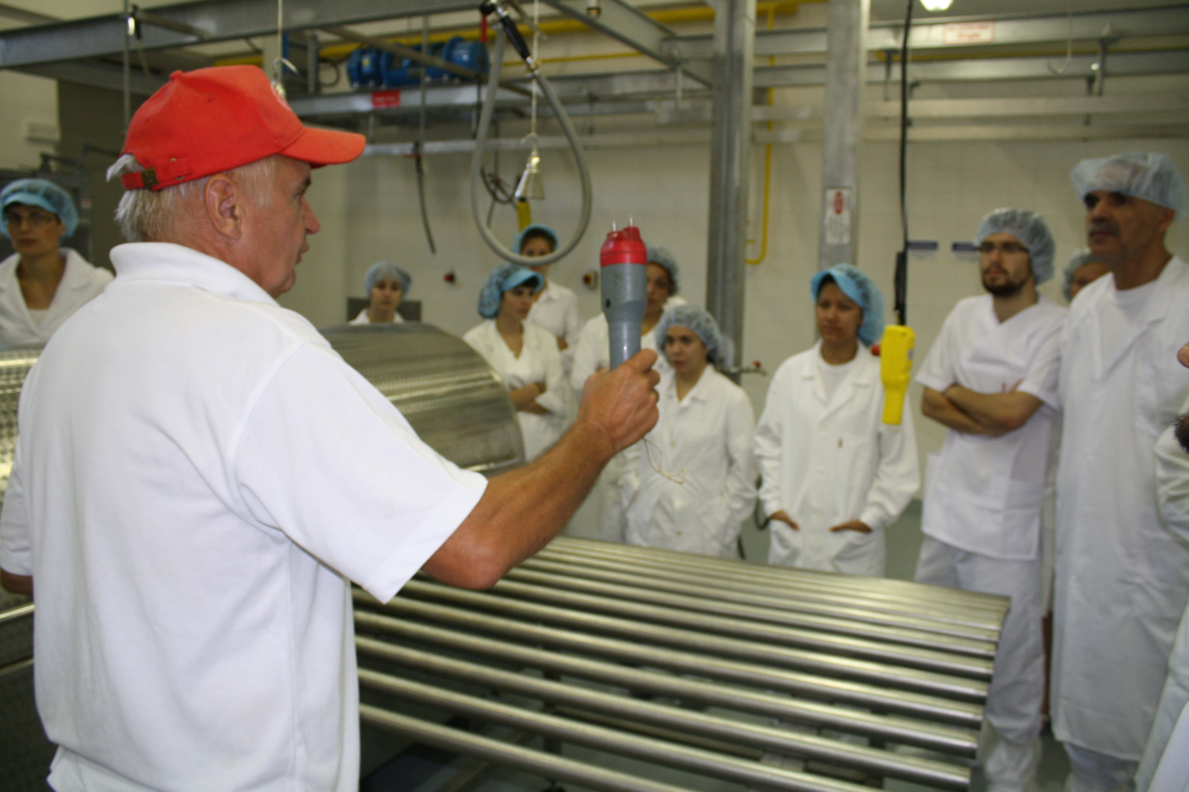 Výuka studentů VFU na univerzitních jatkách